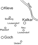 Siedlungsraum "pfälzischer" Siedler am Niederrhein